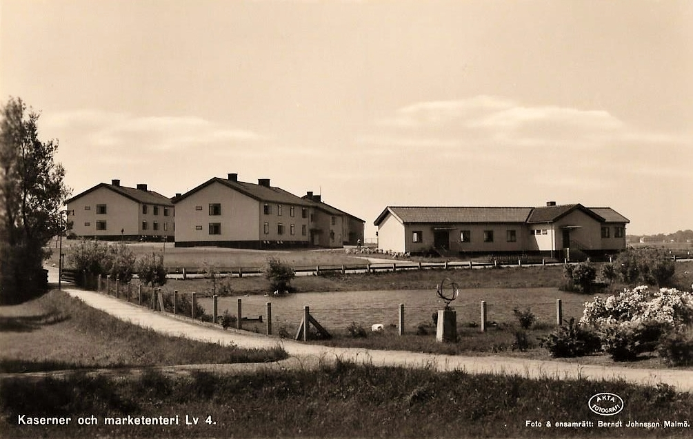 Skånska luftvärnskårens kaserner och marketenteri i Husie, Malmö.